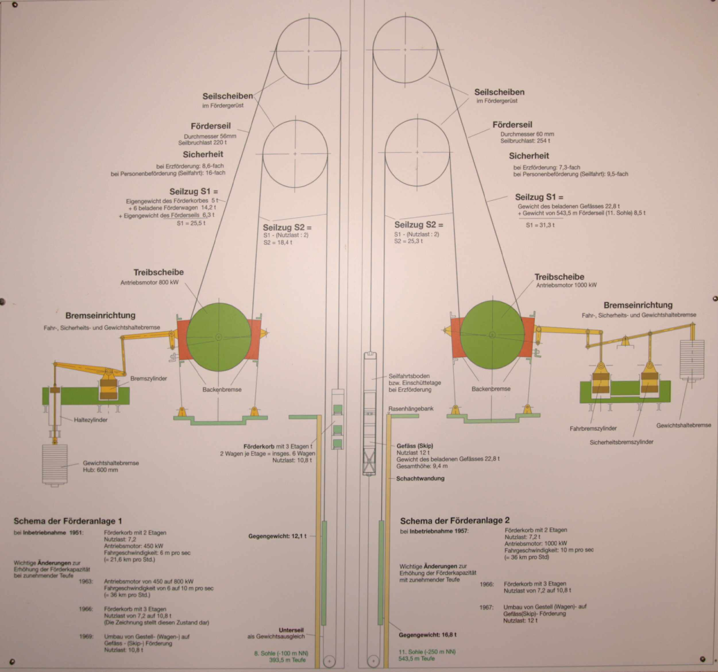 Bergbaumuseum Siciliaschacht Meggen, Schema der Förderanlage